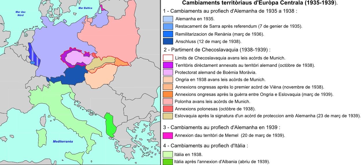 Cambiaments territòriaus d'Euròpa Centrala de 1935 a 1939.